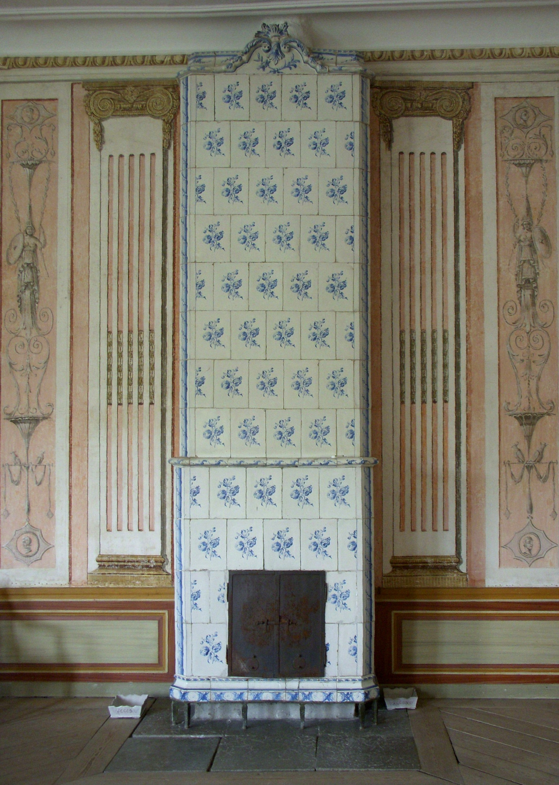 Svindersvik, Nacka, Paviljongen, Sveriges förmodligen högsta kakelugn (4,65 meter)